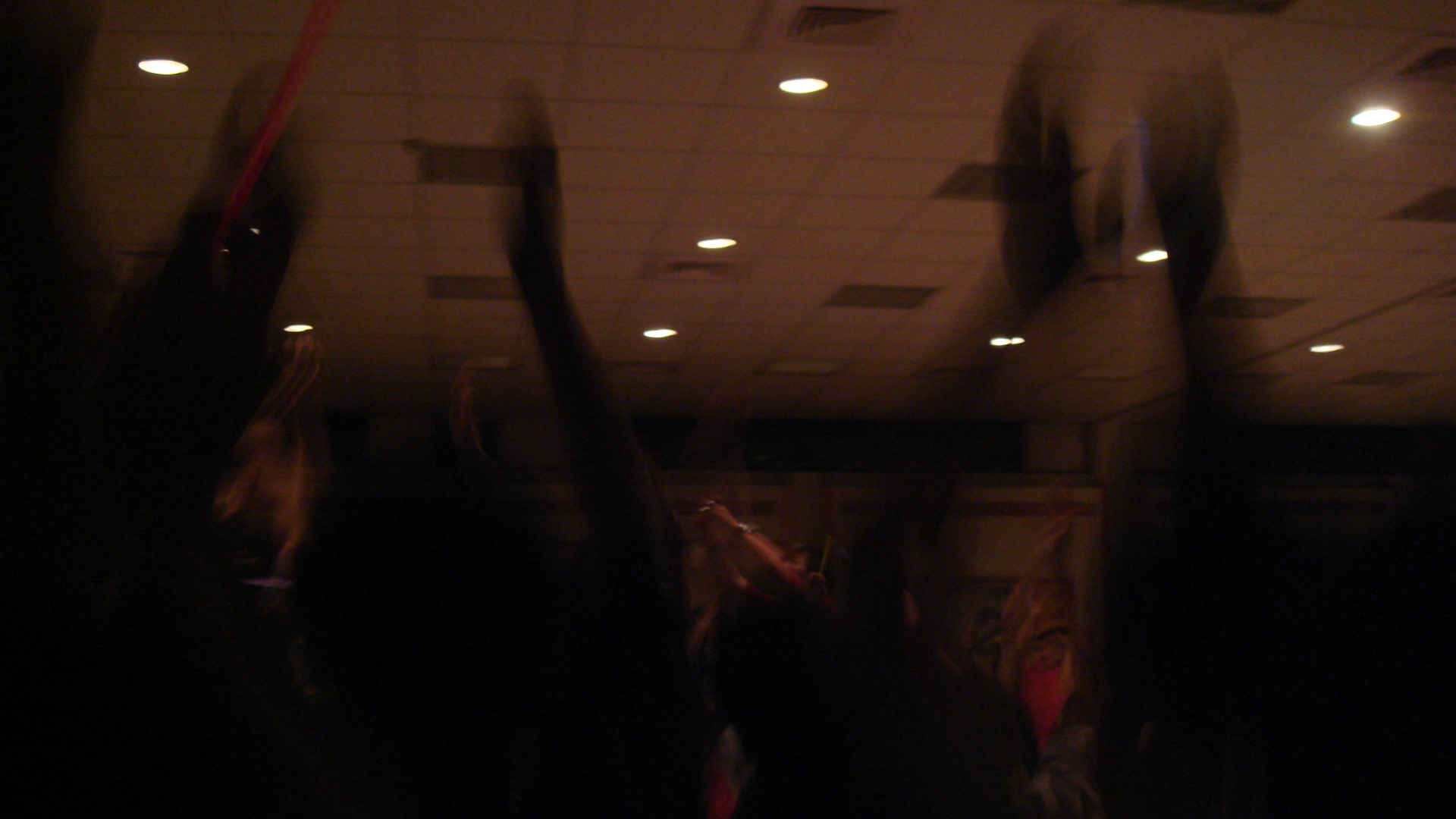 室內人們拍動的雙手。